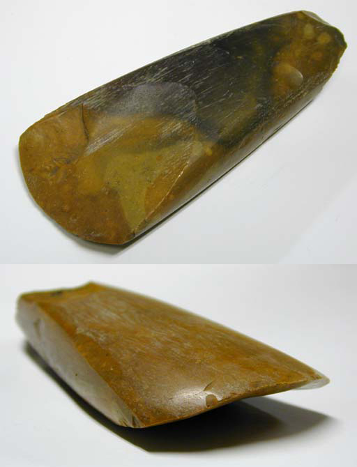 Håleggad flintyxa tillhörande den svensk-norska stridsyxekulturen, med fyndort i södra Sverige. Yxan kommer från lägenheten Karlshemmet, Storegården, Västarps by, Brismene socken, Frökinds härad, Falköpings kommun, f.d. Skaraborgs län, Västergötland, Västra Götalands län, Sverige. Yxan skänktes 1947 till Falbygdens museum i Falköping och har där inventarienumret 1876 (2M16-F1876).